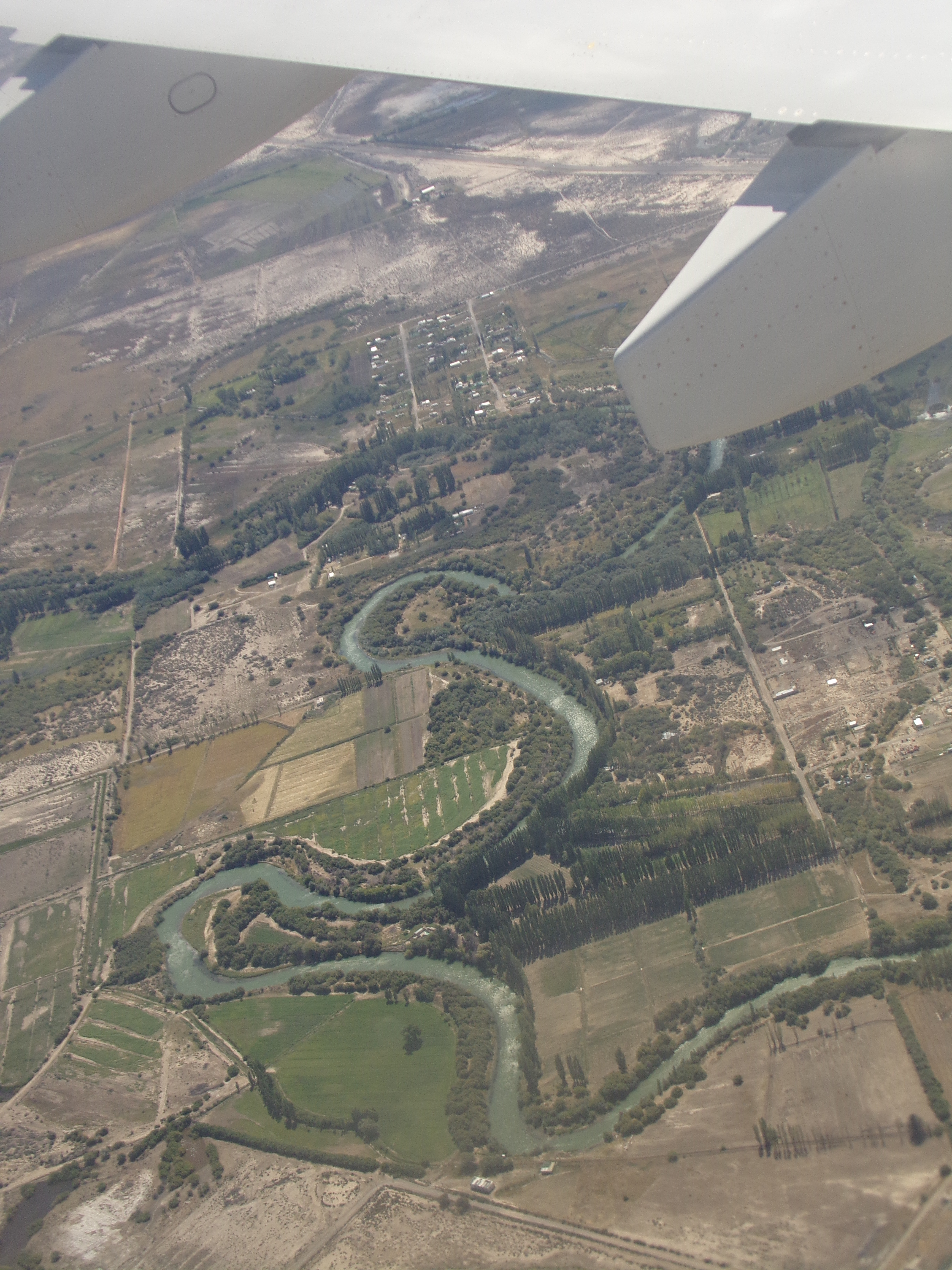 Río Chubut en la zona de chacras de Trelew, en dirección a Rawson